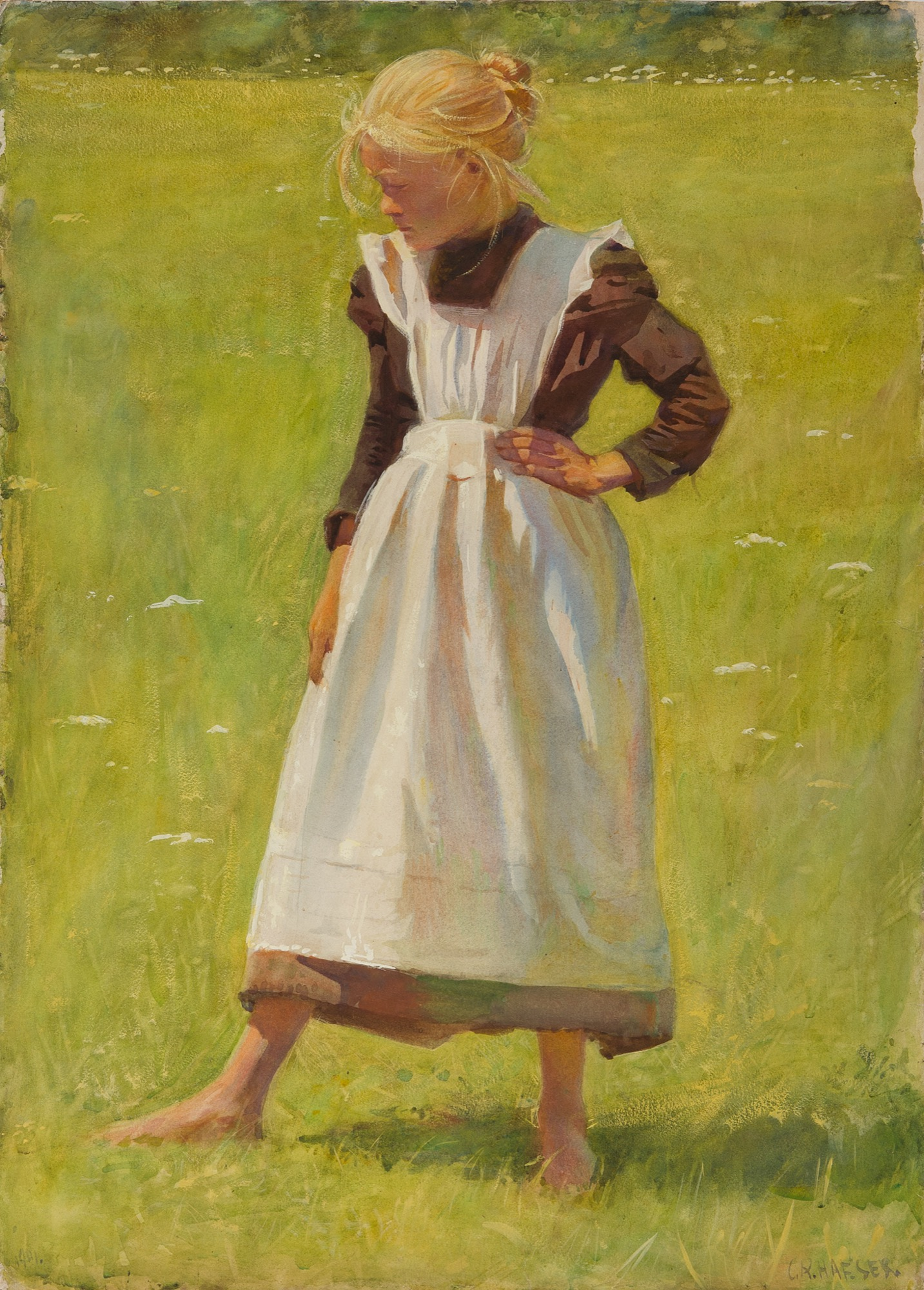 Aquarell und Gouache auf festem Velin von Carl Reinhold Haeser, 1901. Ca. 77x56 cm. Signiert unten rechts, datiert unten links. Mädchen auf einer Blumenwiese.